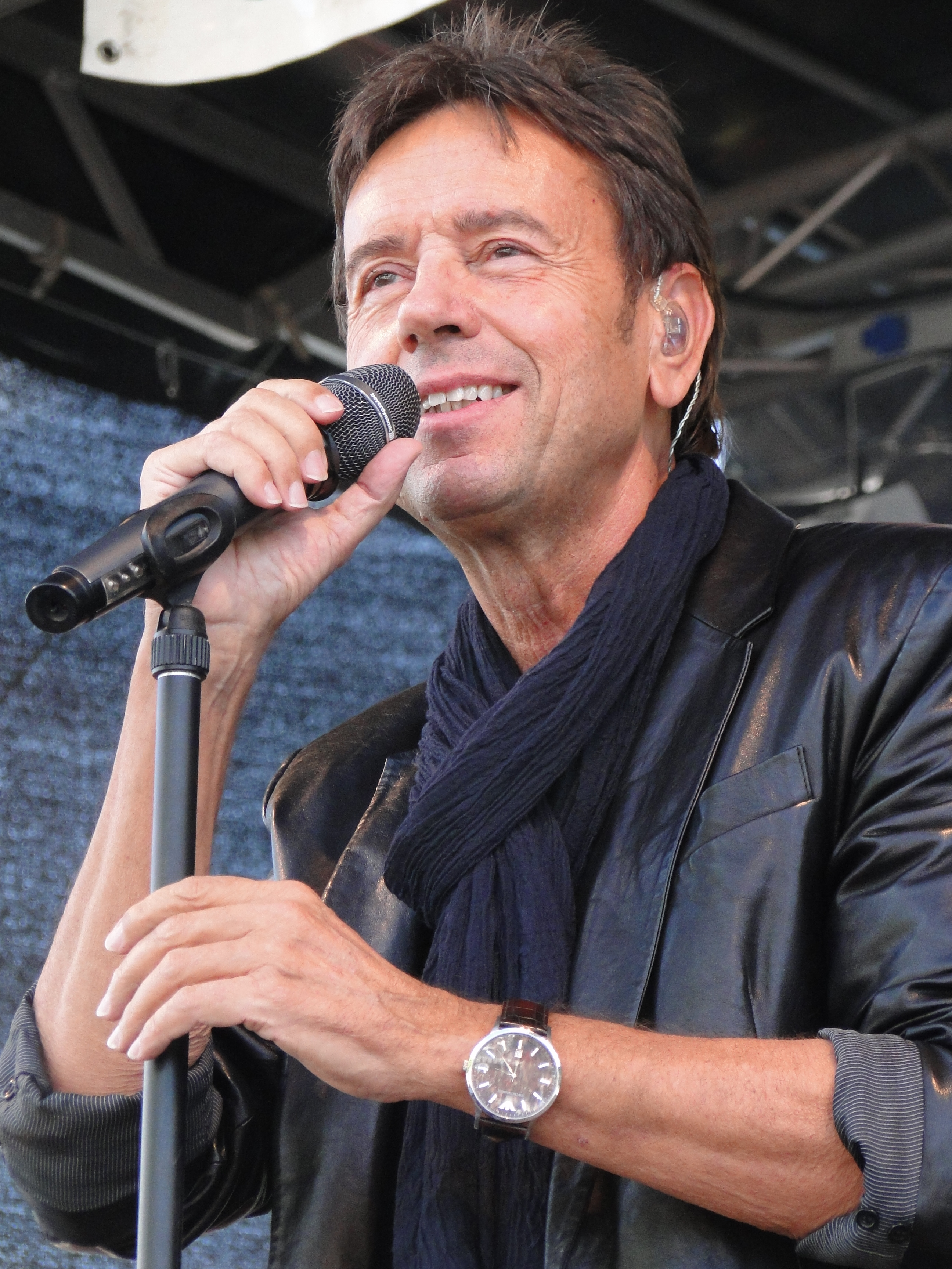 Sänger Wolfgang Ziegler bei einem Auftritt in Dresden 2012